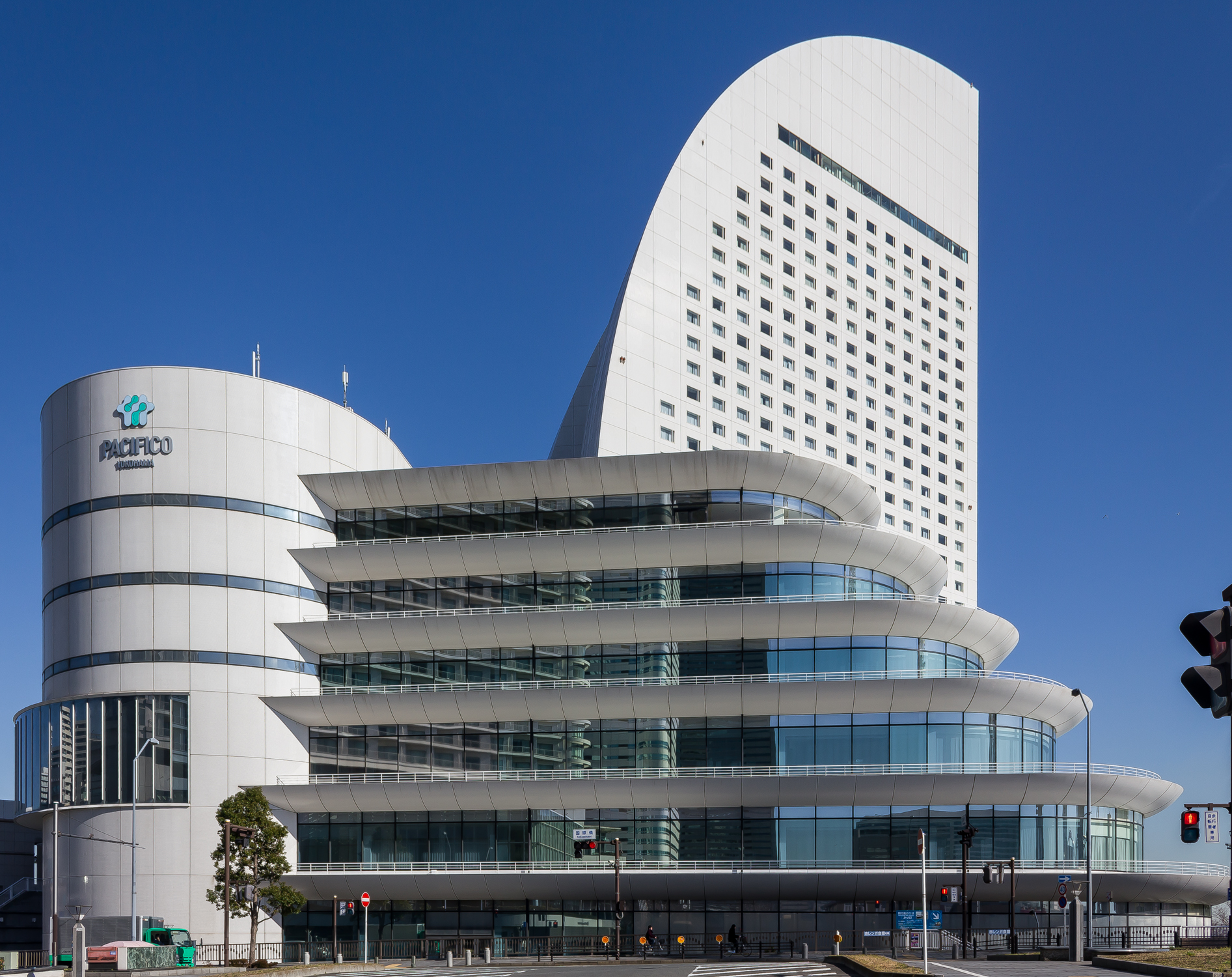 横浜国際平和会議場（ヨコハマグランドインターコンチネンタルホテルと会議センター）